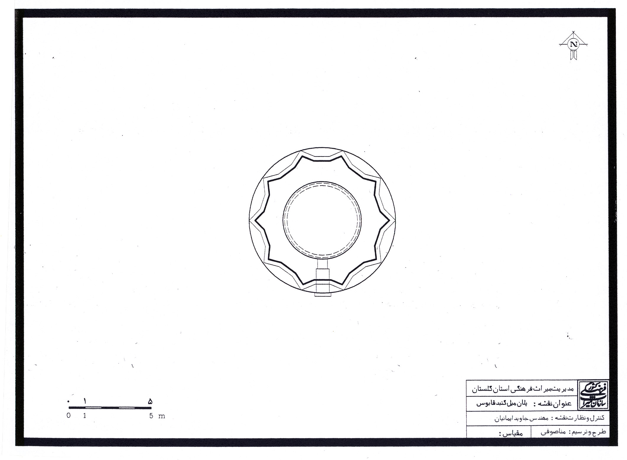 پلان برج قابوس